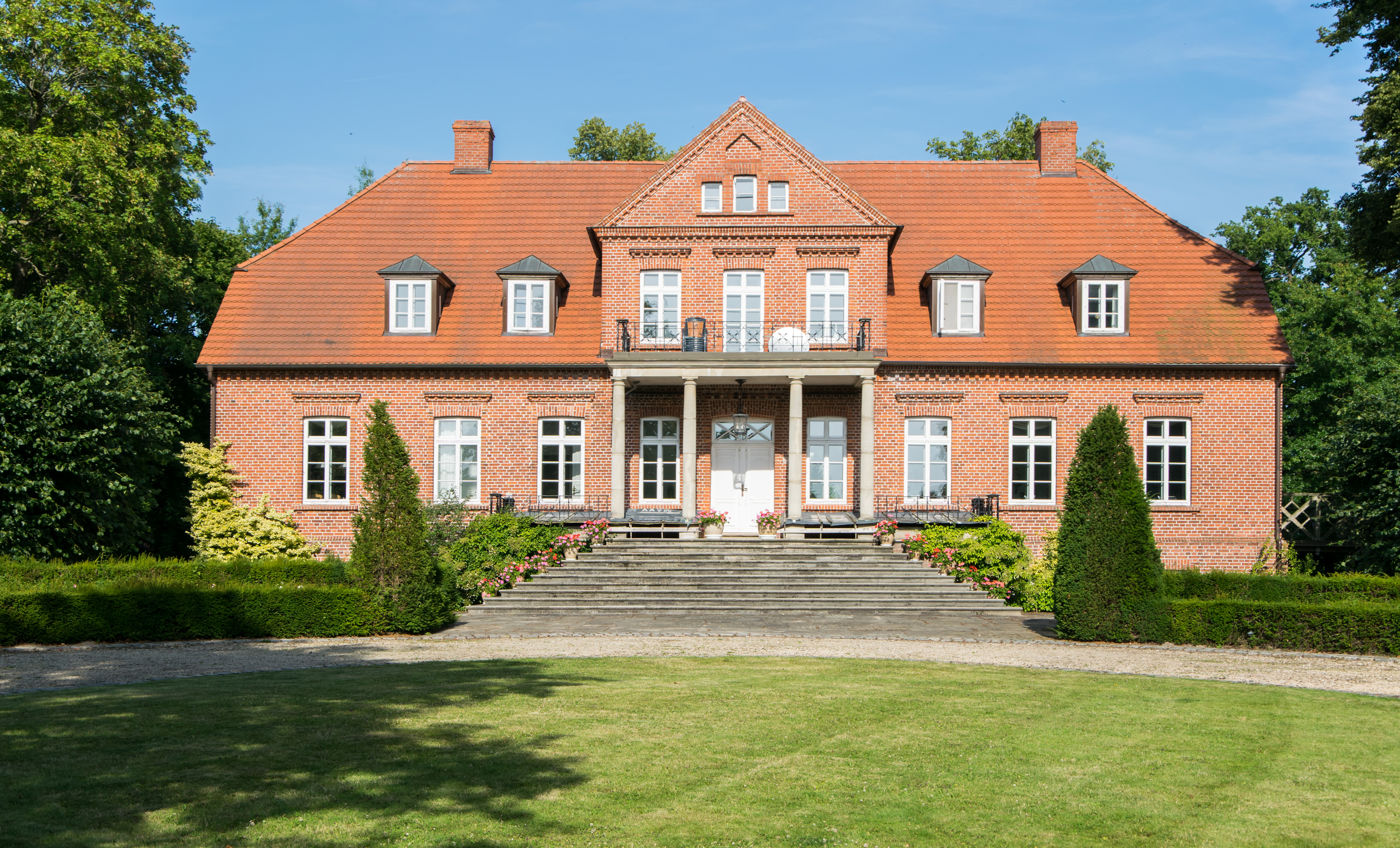 Groß Viegeln Gutshaus